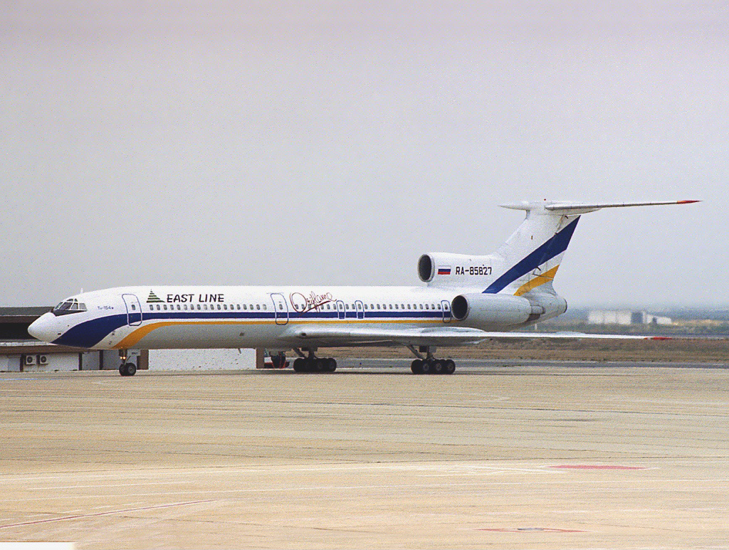 East Line Airlines Tupolev Tu-154M